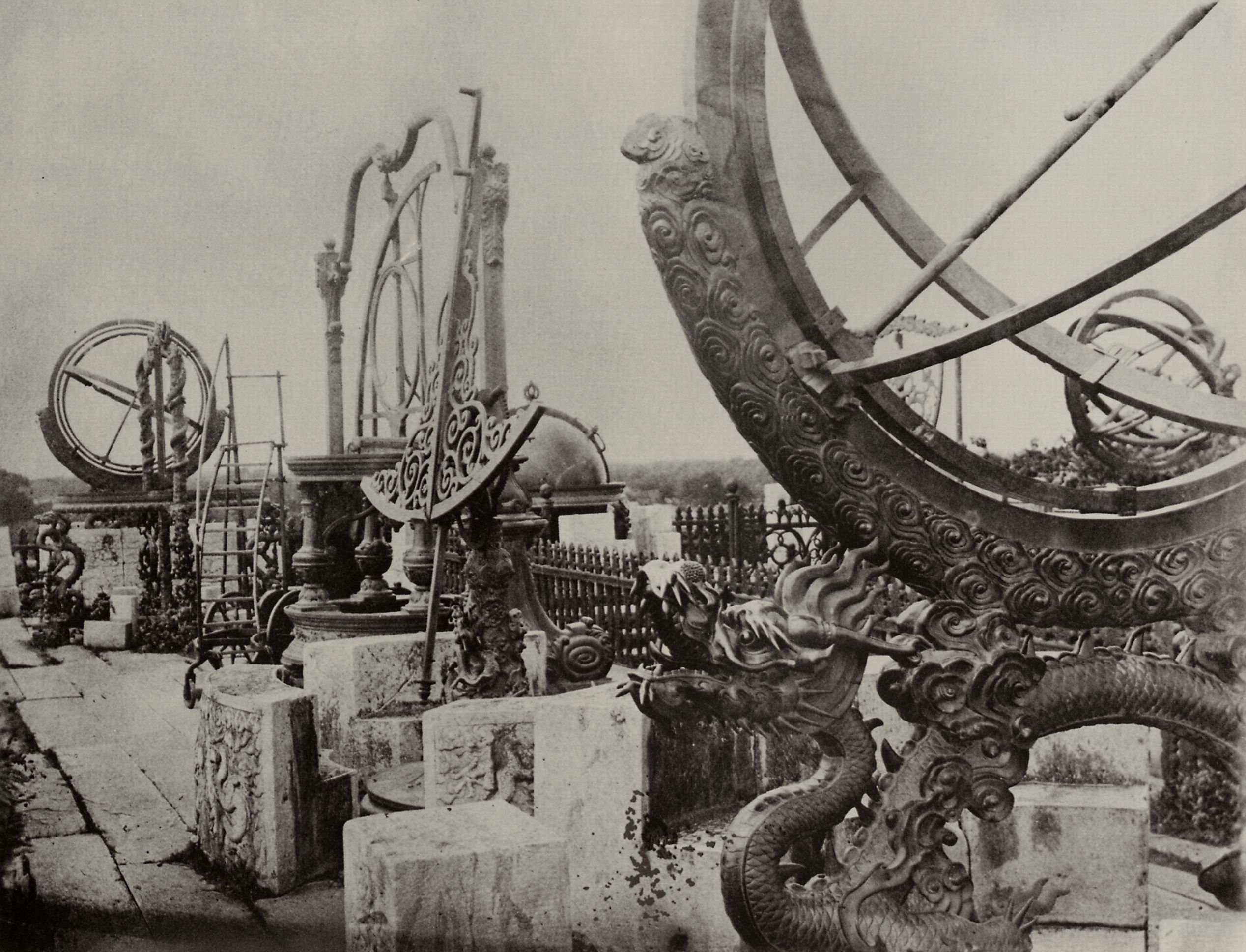 Childe, Thomas: Sternwarte, Peking. Observatory, Peking, c.1875. Terrace view. Quote from Nature (1889-1890) Vol.41 (VOLUME XLI) Nov. 21, 1889. p.6: Mr. Thomas Child, who has just returned from Pekin, has sent us very beautiful photographs of the two interesting old astronomical instruments at the Pekin Observatory. These instruments are the most ancient of the kind in the world, having been made by order of the Emperor Kublai Khan in the year 1279. They are exquisite pieces of bronze work, and are in splendid condition, although they have been exposed to the weather for more than 600 years. They were formerly up on the terrace, but were removed down to their present position to make way for the eight instruments that were made by the Jesuit Father Verbiest in 1670, during the reign of the Emperor K’ang Hsi, of the present dynasty.